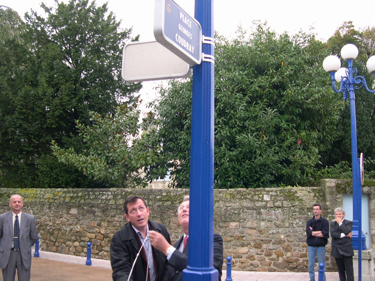 Inauguration de la place Georges Coudray Son petit-fils, Georges Coudray III, et le maire de Saint-Malo, René Couanau dévoilent la plaque Photo prise par l'auteur TCY